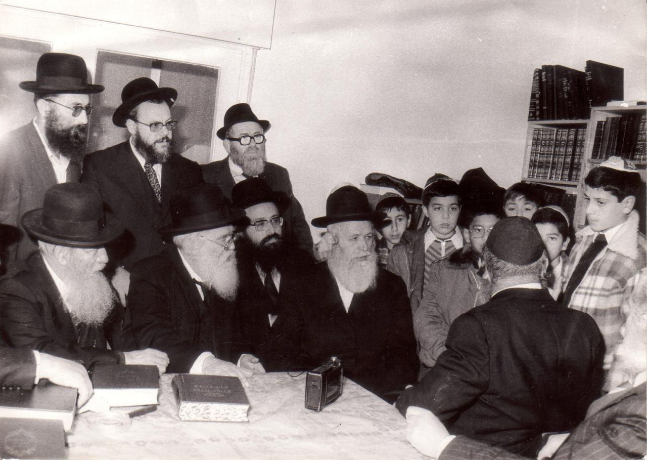 הרב שך בוחן תלמידים